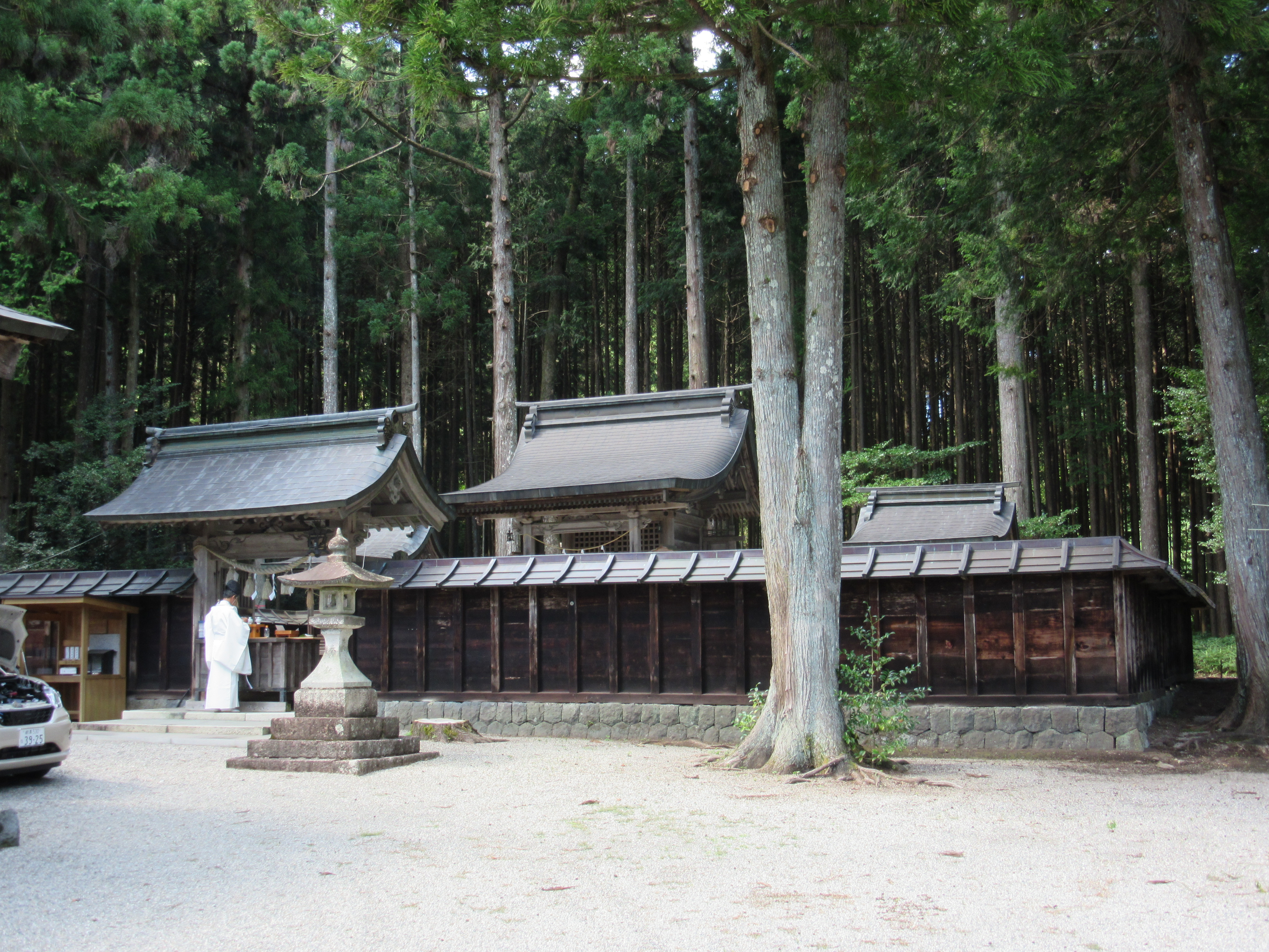 護山神社本社